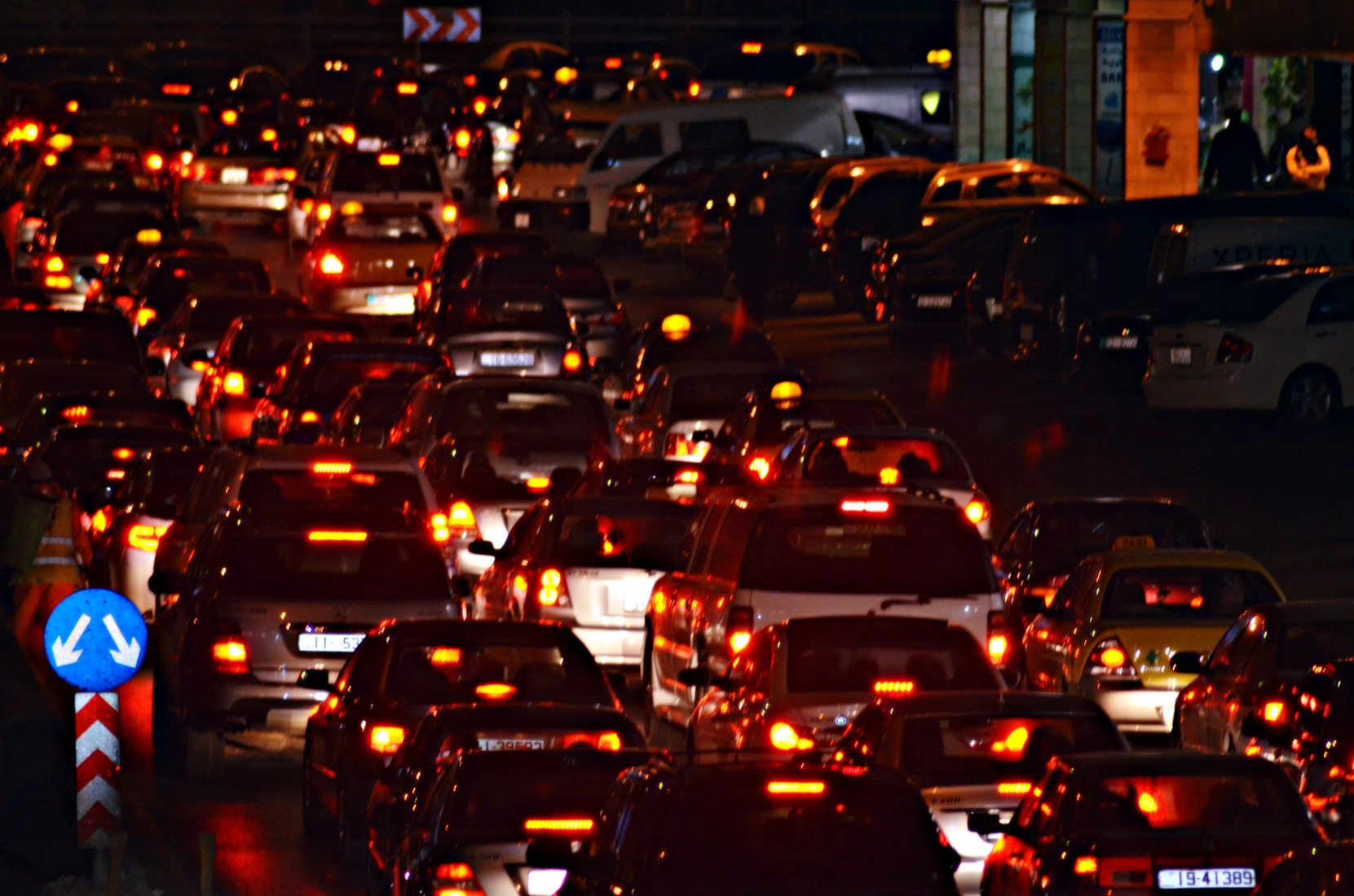 الزحام في عمّان ليلاً، الأردن